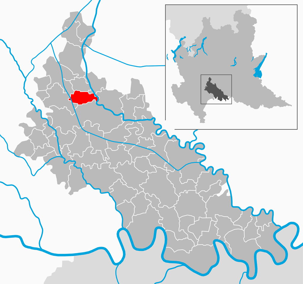 Il comune di Montanaso Lombardo nella provincia di Lodi